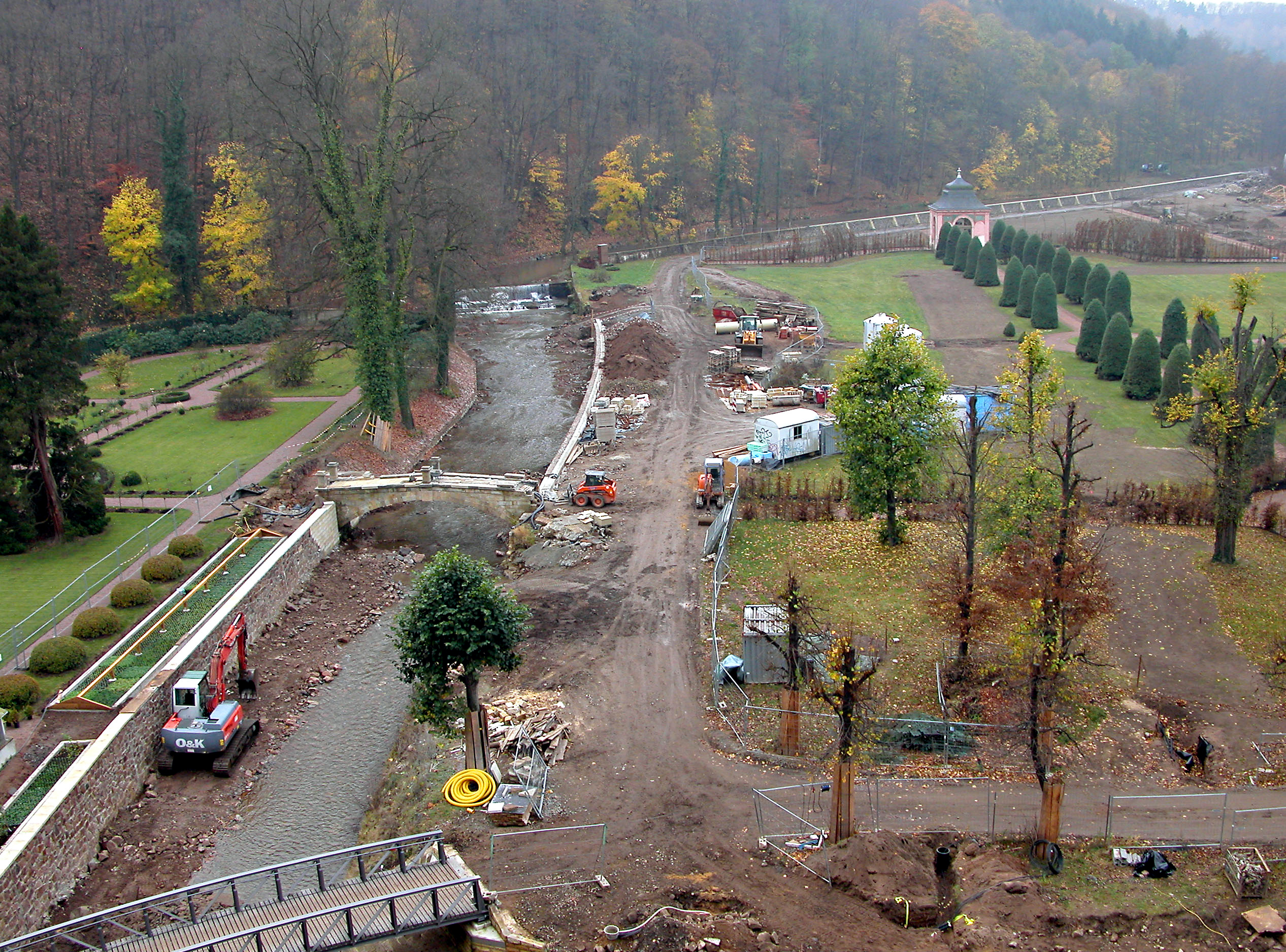 10.11.2005 01809 Weesenstein (Müglitztal) Am Schloßberg 1 (GMP: 50.932966,13.858732): Blick vom Schloß in den Park. Sanierungsarbeiten zur Beseitigung der Schäden vom Hochwasser der Müglitz im August 2002. [DSCN8299.TIF]20051110210DR.JPG(c)Blobelt